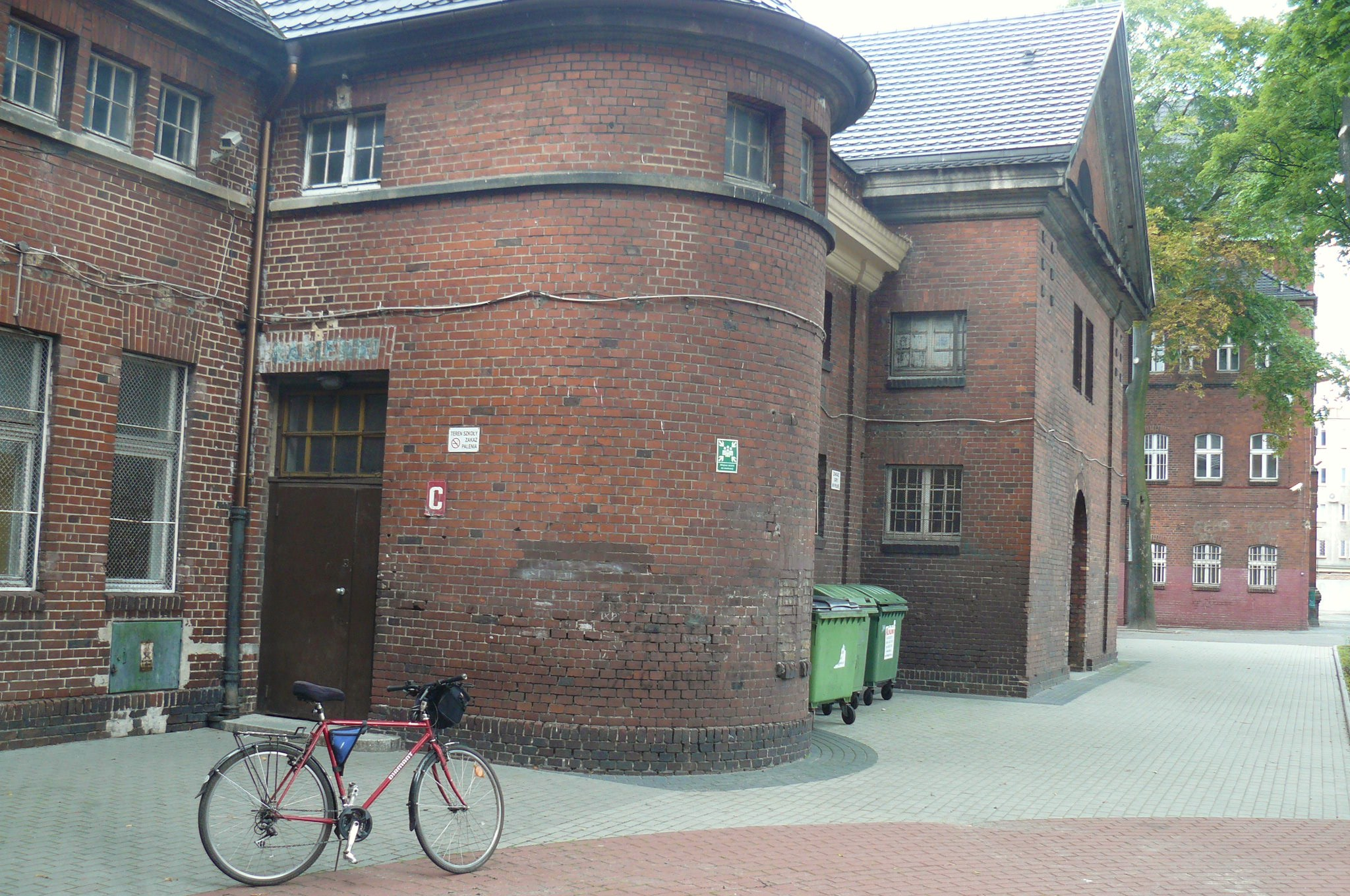 Poznań Jeżyce, ul. Słowackiego 54/60 - Szkoła Podstawowa nr 36 im. Henryka Sucharskiego, zespół zabudowań szkolnych